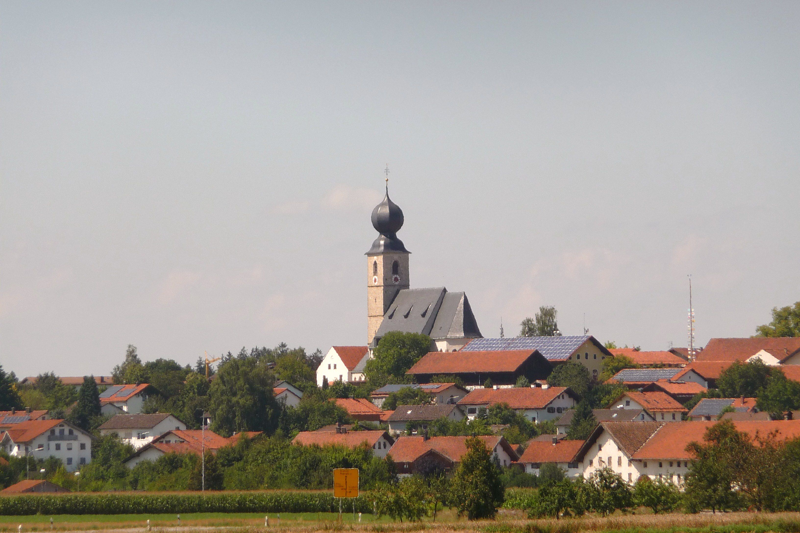 Blick auf Engelsberg mit der Pfarrkirche St. Andreas